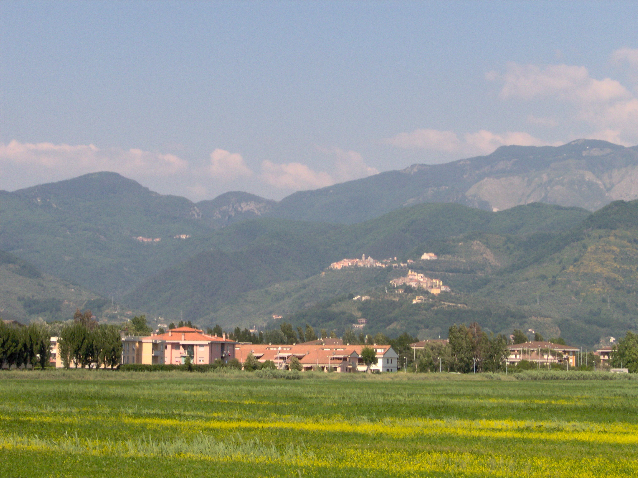 Luni Mare - Nello sfondo Ortonovo e Nicola visti dal viale XXV aprile